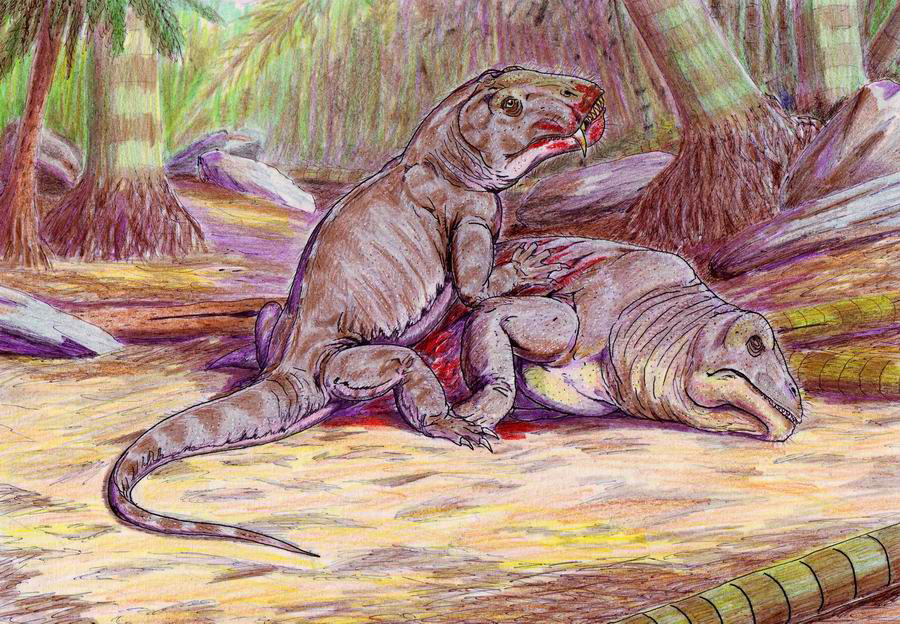 Titanophoneus & Ulemosaurus- reconstruction autor - Bogdanov